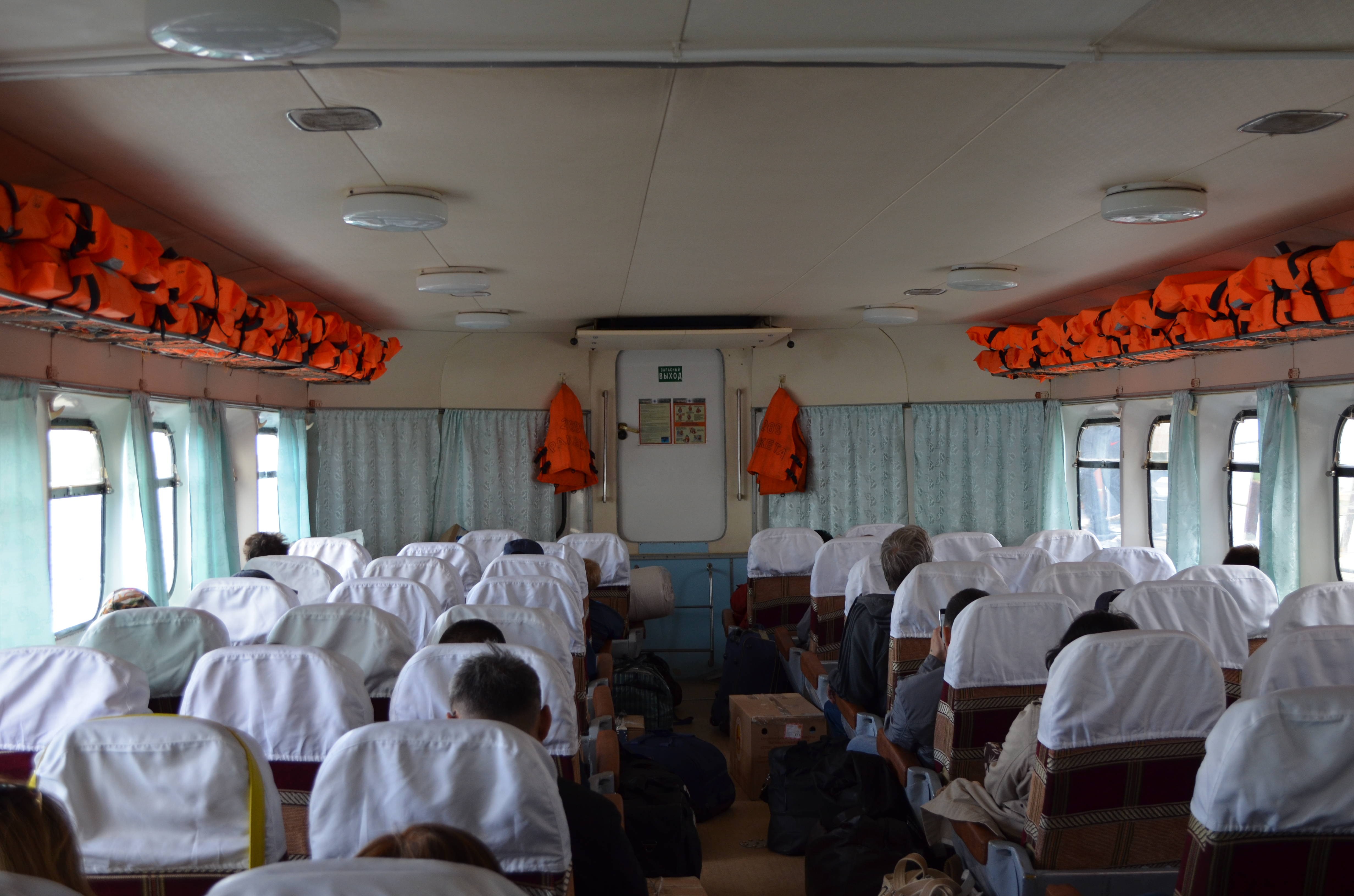 Поездка в Сангар 19-20.06.2016 на теплоходе Ракета-269